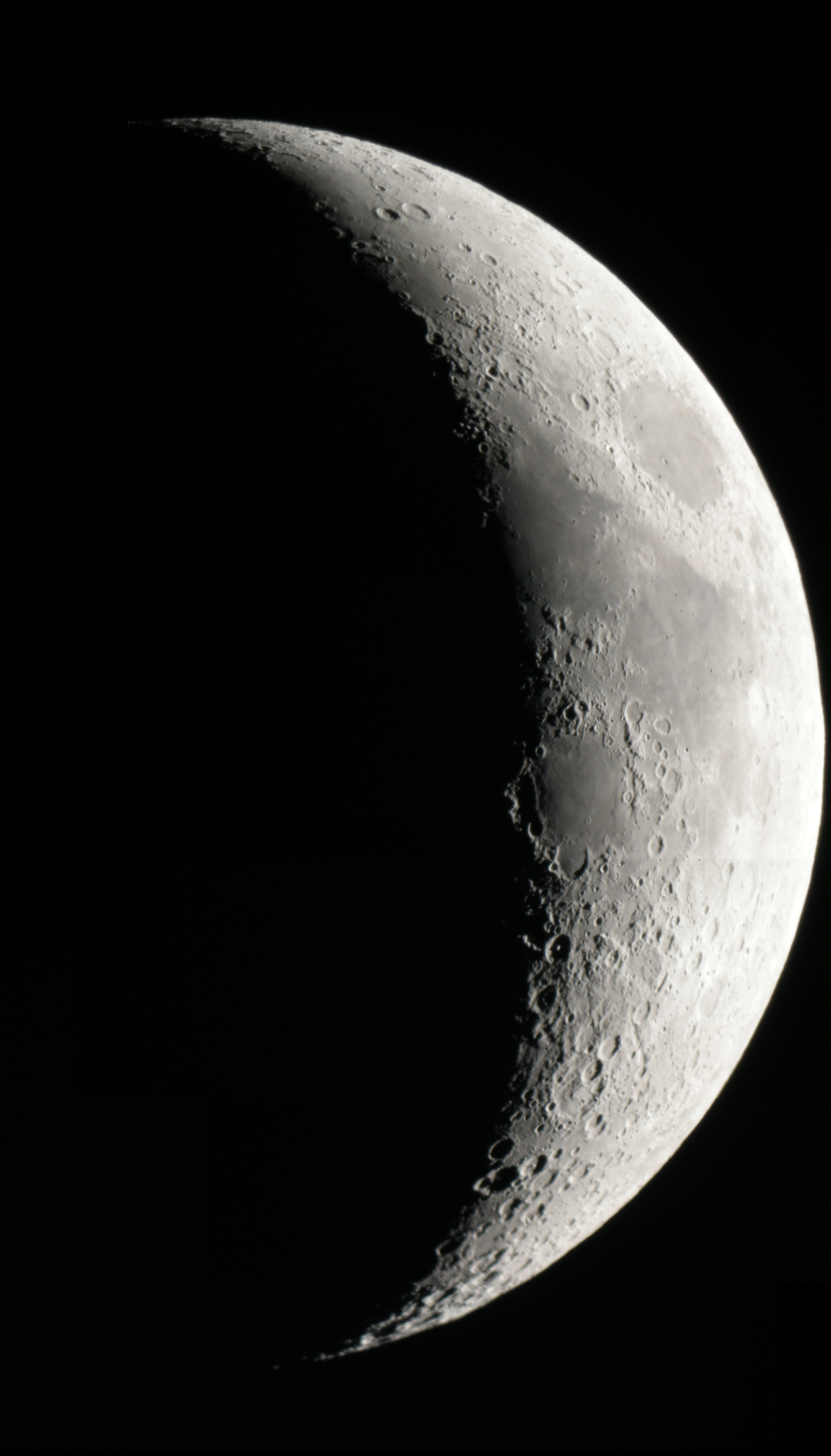 Mosaïque de 5 photos prises avec un Nikon Coolpix P5000 mis en afocal derrière un téléscope "Celestron C8" de 2000 mm de focale équipé d'un oculaire de 40 mm de focale.